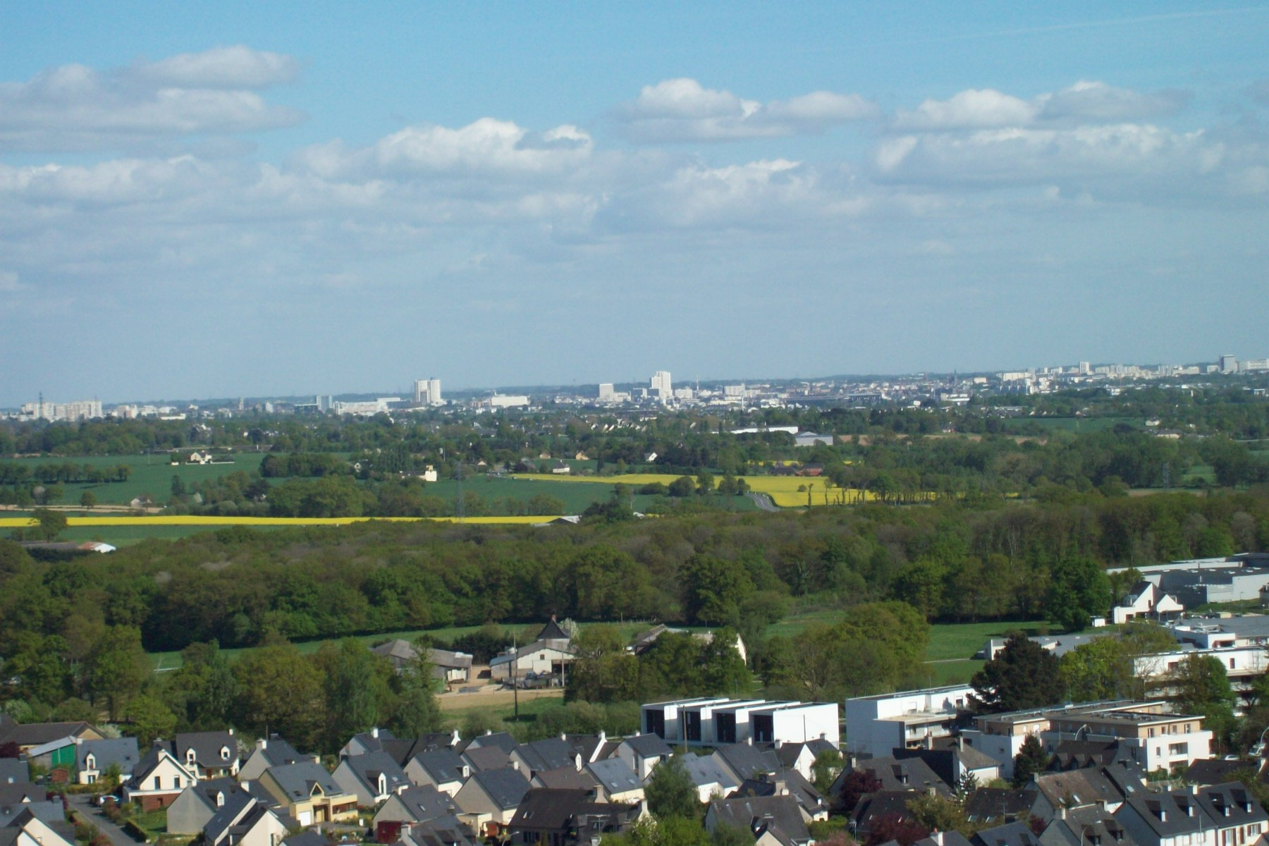 Vue de Rennes du haut d'une nacelle 52 m à l'Hermitage.